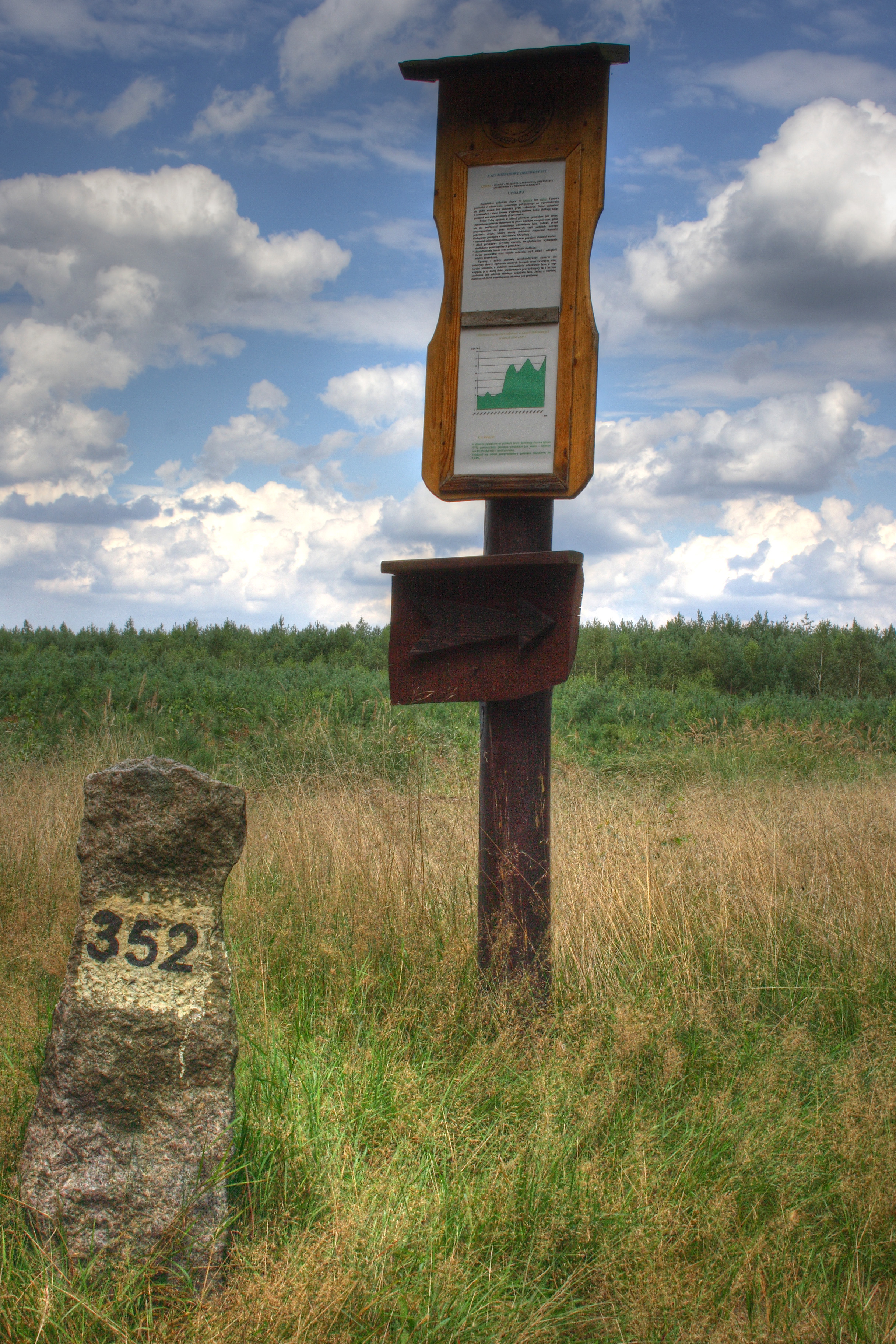 Jeden z przystanków ścieżki spacerowo-dydaktycznej przy Ośrodku Edukacji Przyrodniczej i Leśnej, Nadleśnictwie Kliniska, woj. zachodniopomorskie